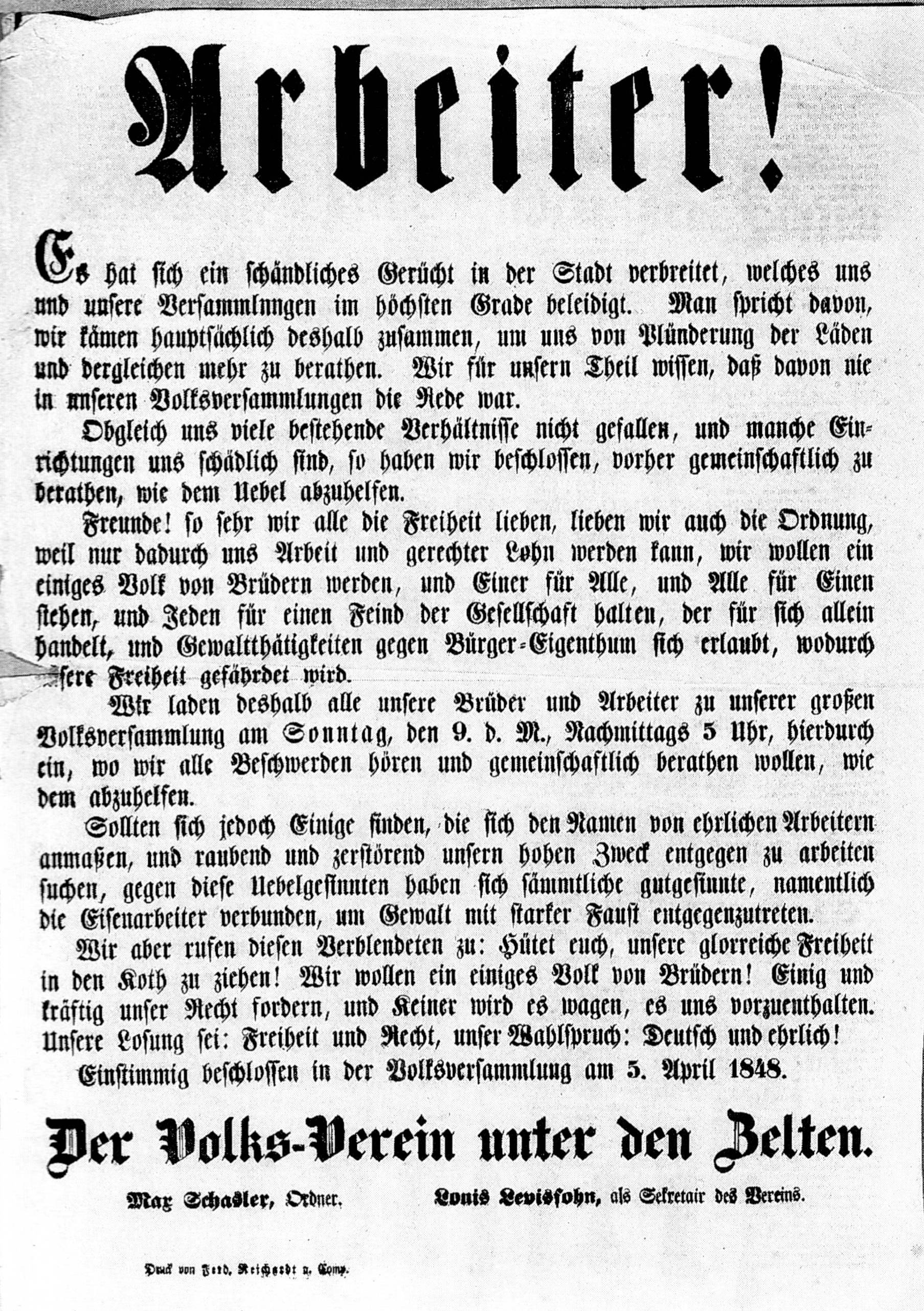 Max Schasler und Louis Levinsohn, Berlin 1848. “Arbeiter!”